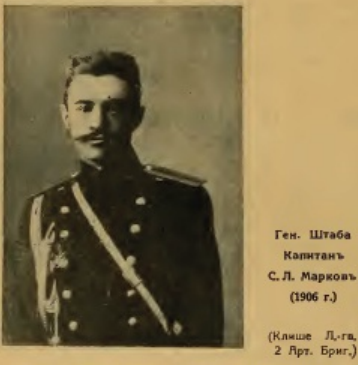 Капитан Сергей Марков, 1906 год